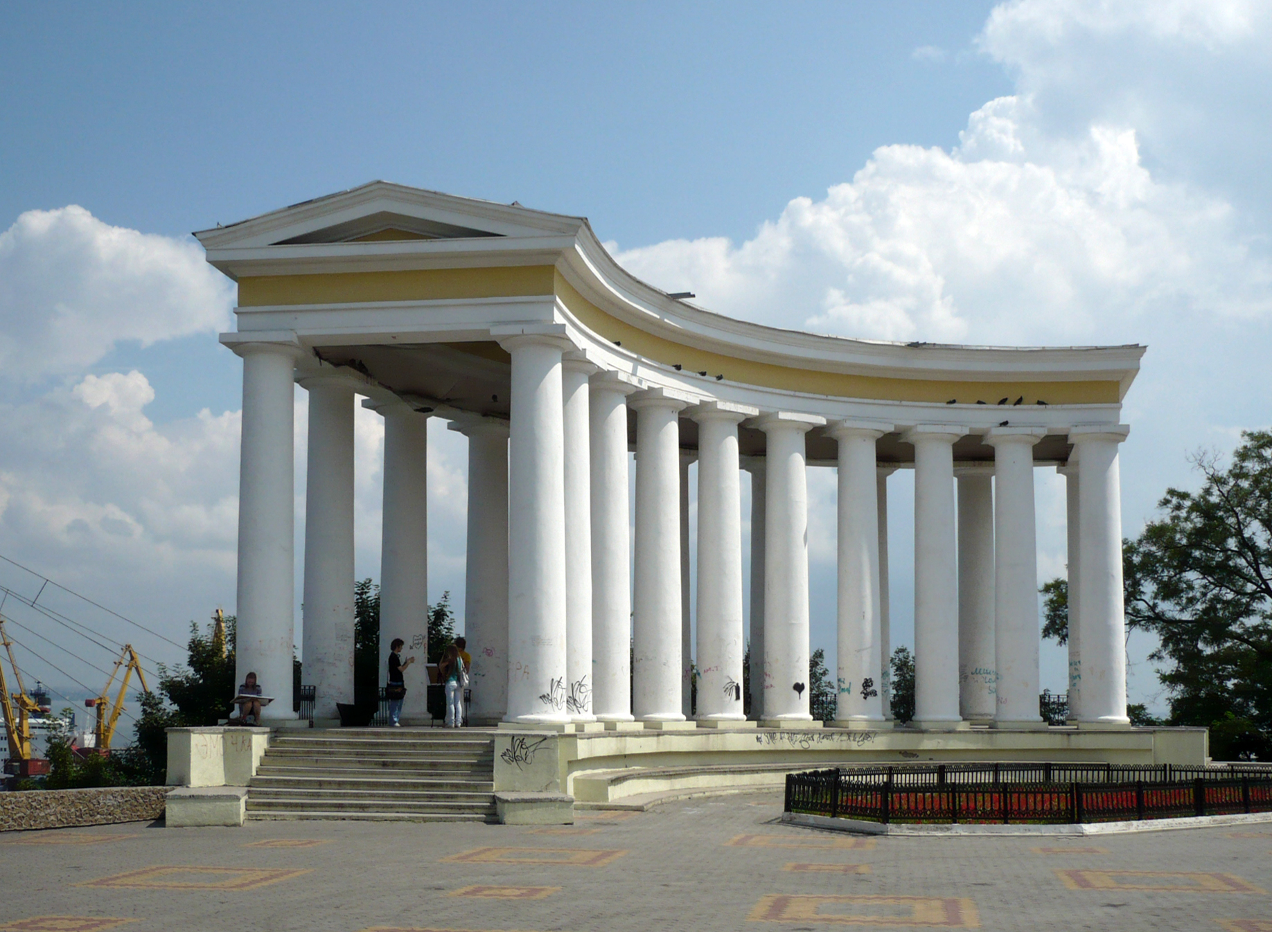 Rotunda przy pałacu Woroncowa